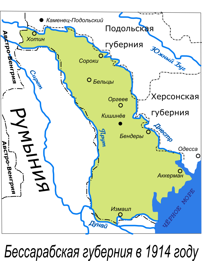 Бессарабская губерния в 1914 годуСозданно в Inkscape. Векторный оригинал в коммонс Image:Bessarabia.svg